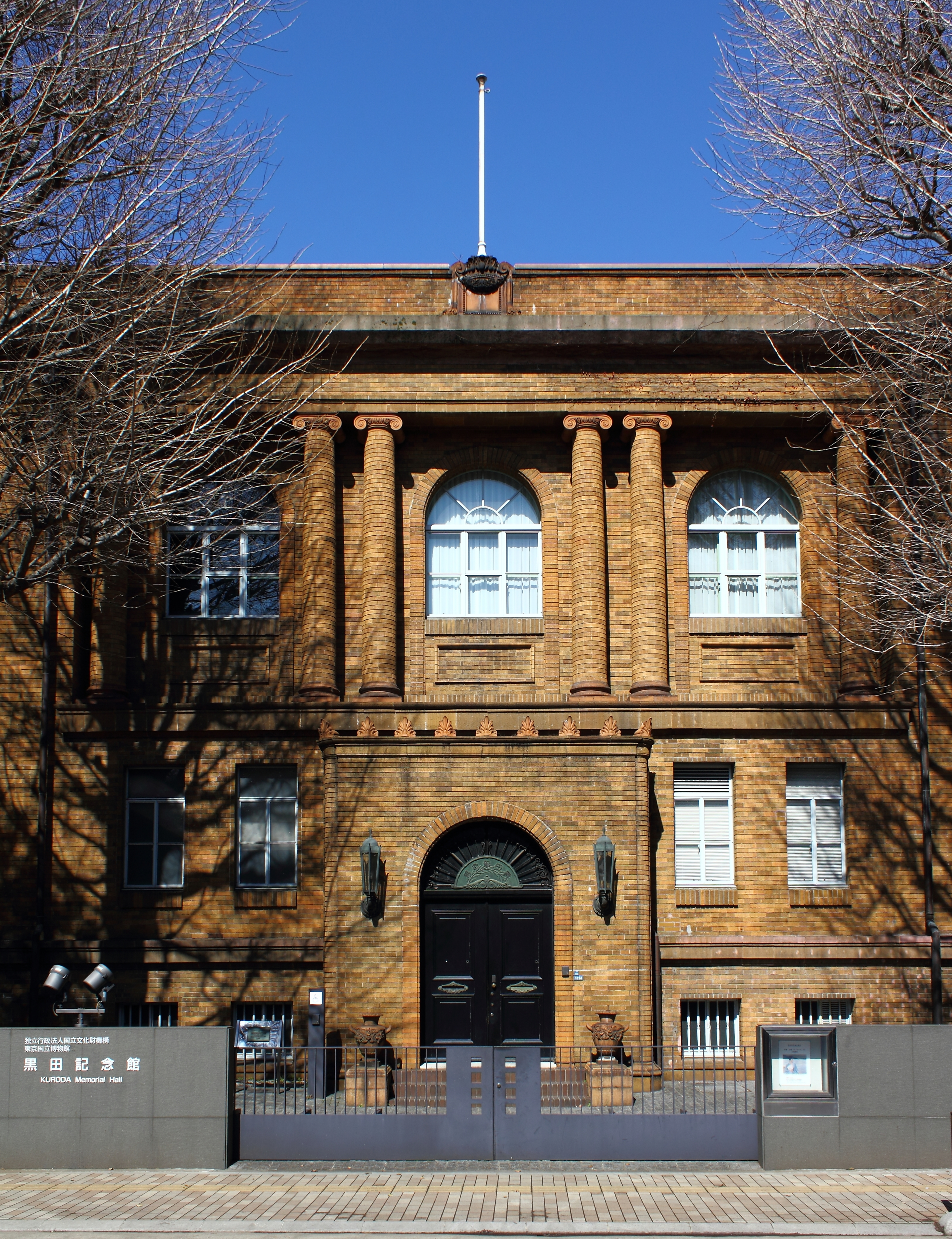 黒田記念館（国の登録有形文化財）。東京都台東区。